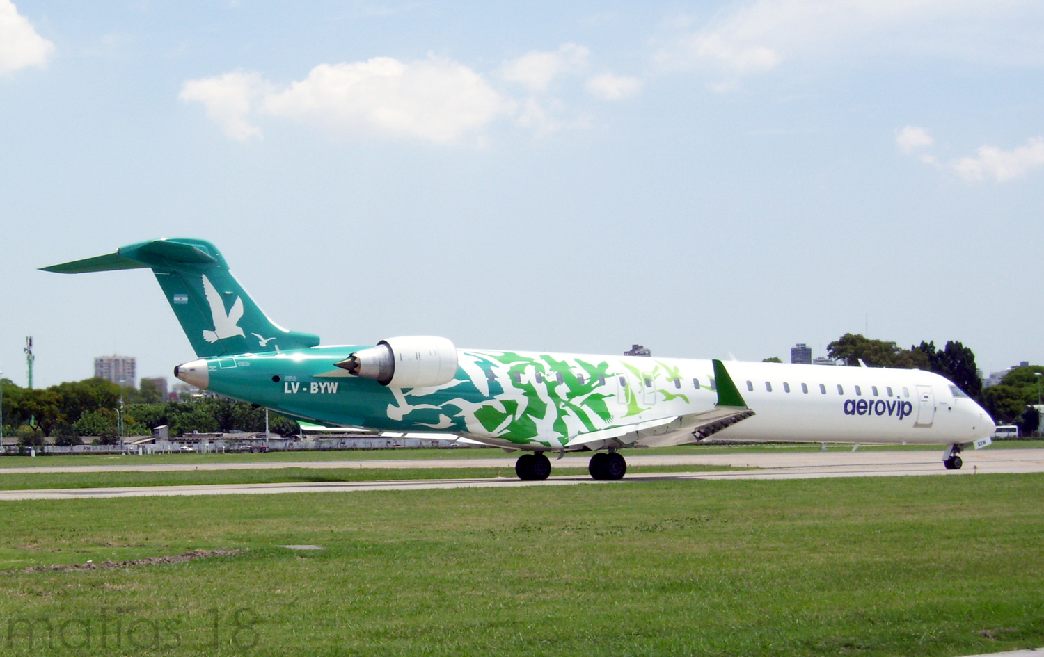 CRJ-900 de Aerovip rodando hacia la cabecera 13 en el Aeroprque Jorge Newbery.